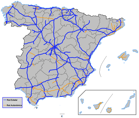 Red española de autopistas y autovías